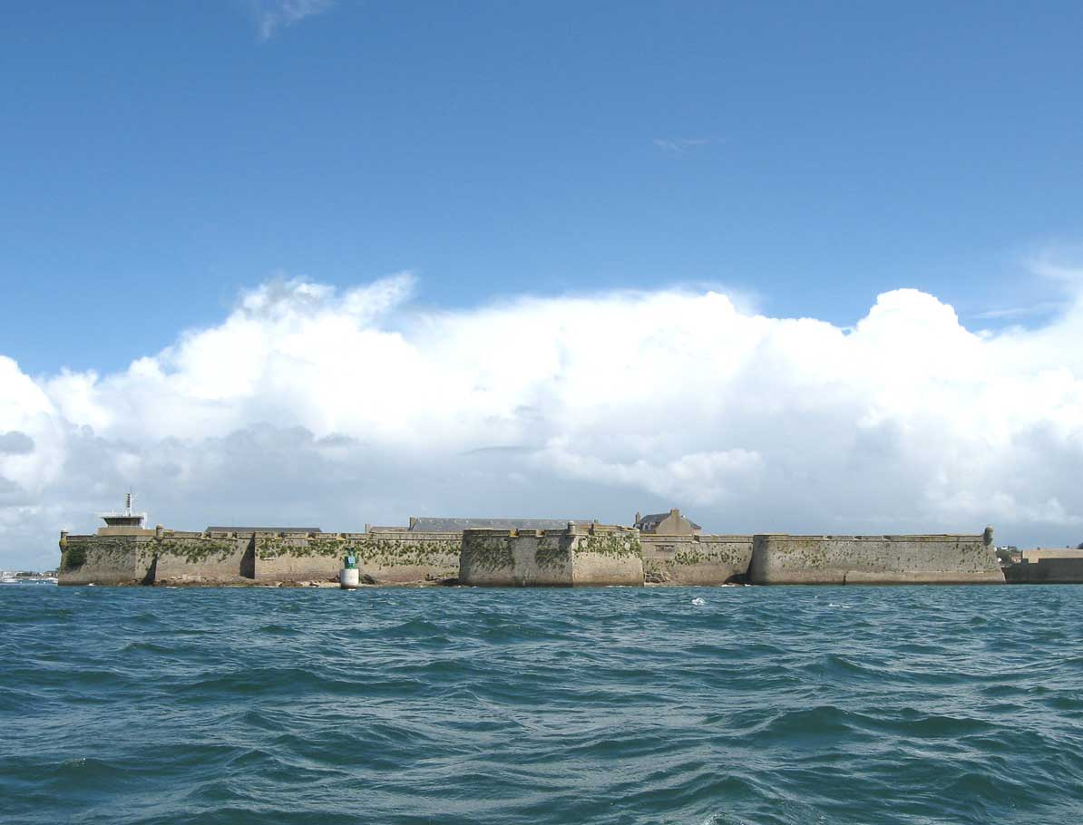 Description : Port-Louis vue depuis le chenal de Lorient Place : Port Louis, Bretagne, France Date : 2006 Auteur : Pline